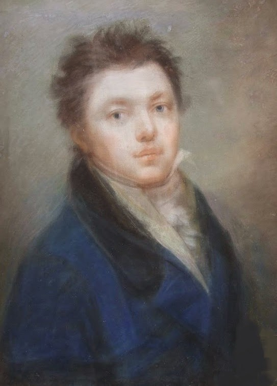 Ромбауер Янош (1782-1849)